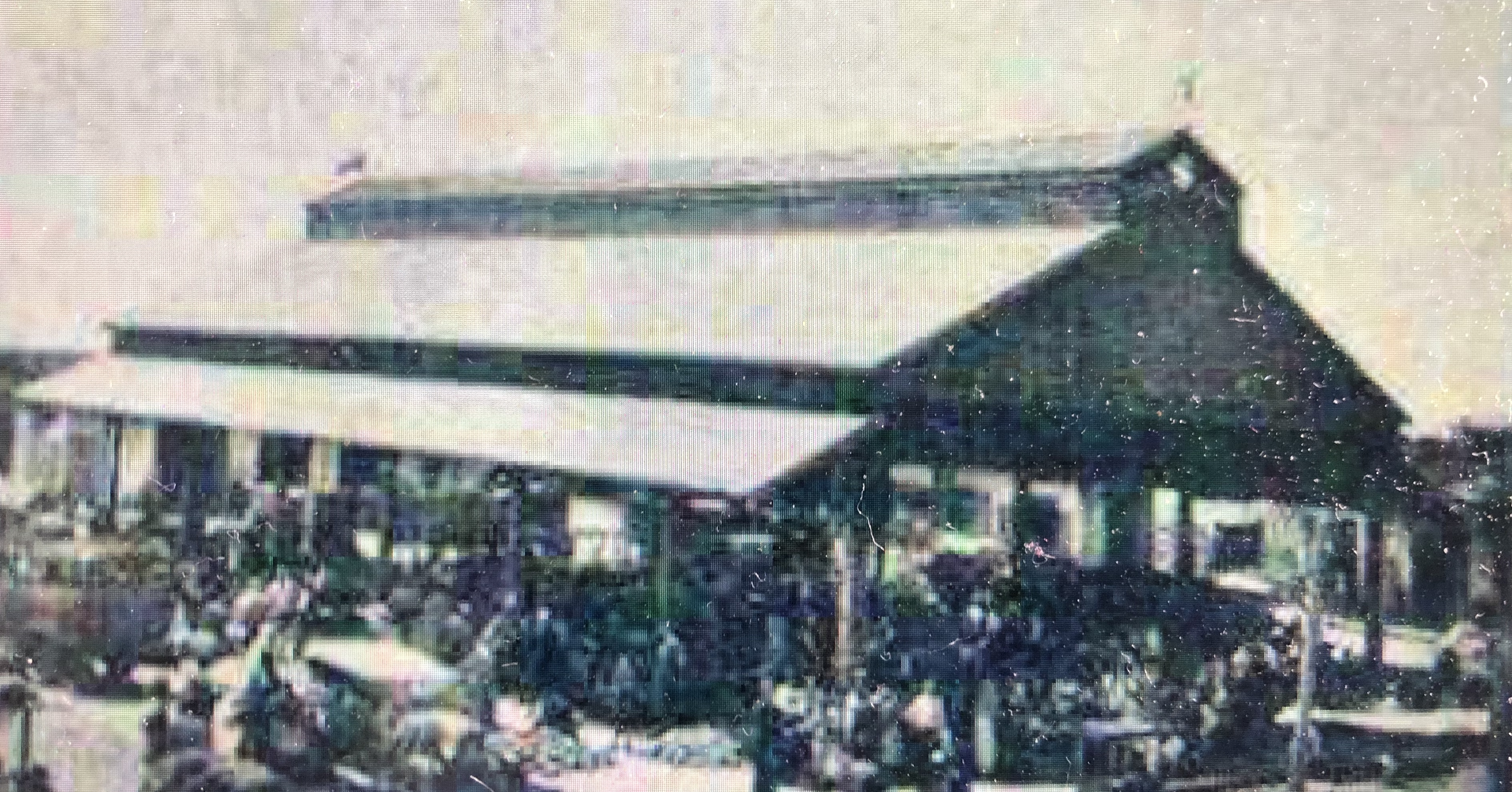 la halle principale de Kaméchli